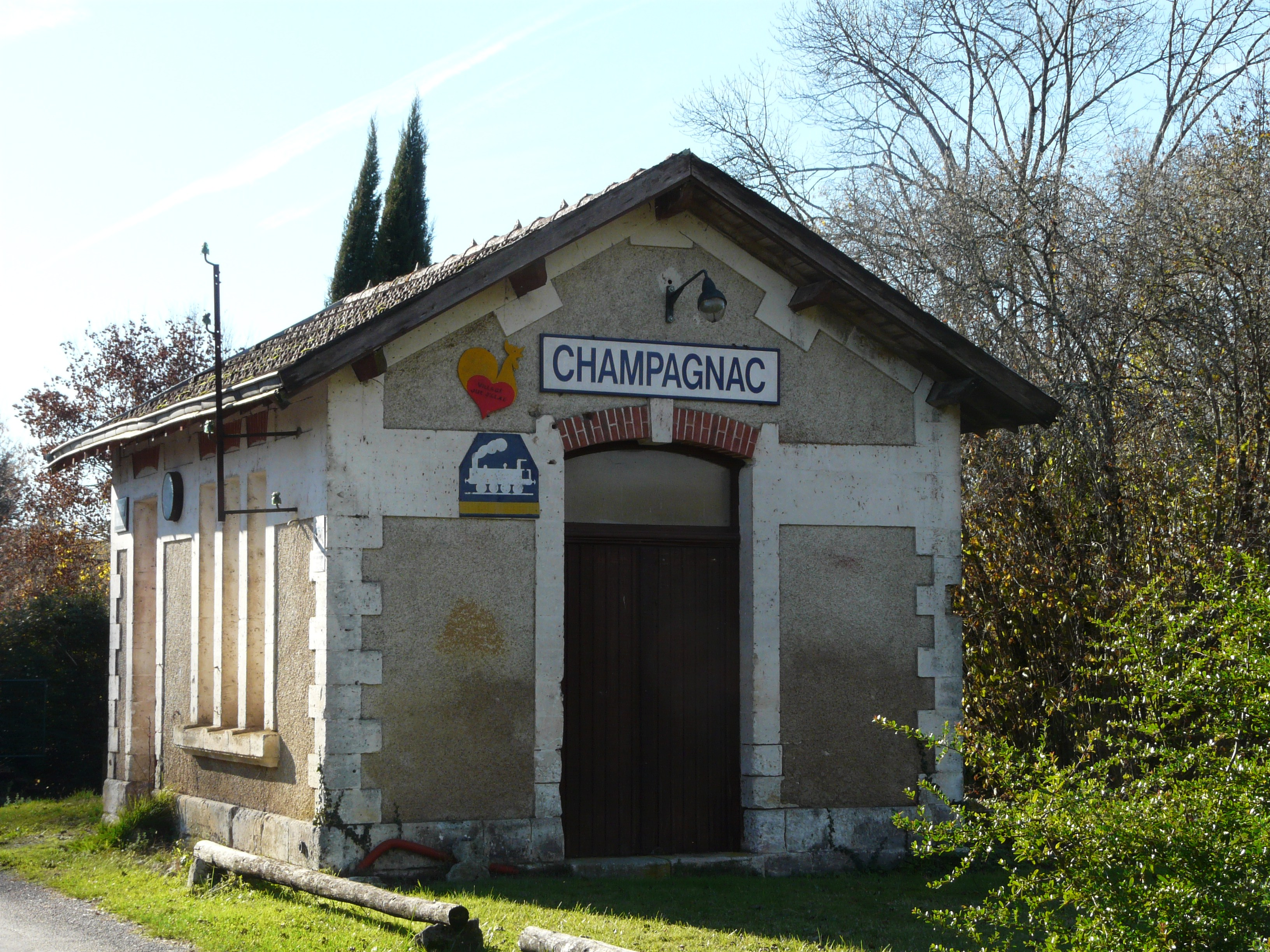 L'ancienne gare du tramway de Périgueux à Saint-Pardoux-la-Rivière, Champagnac-de-Belair, Dordogne, France.